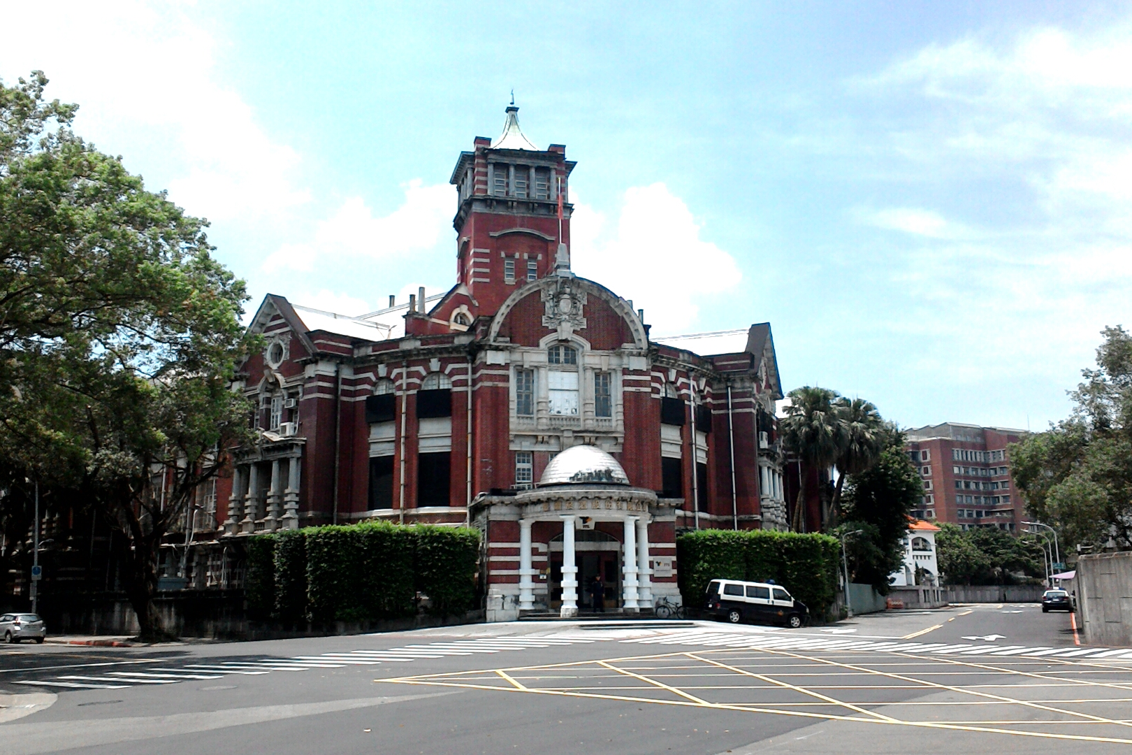 台灣總督府專賣局,台北市中正區南門次分區龍福里